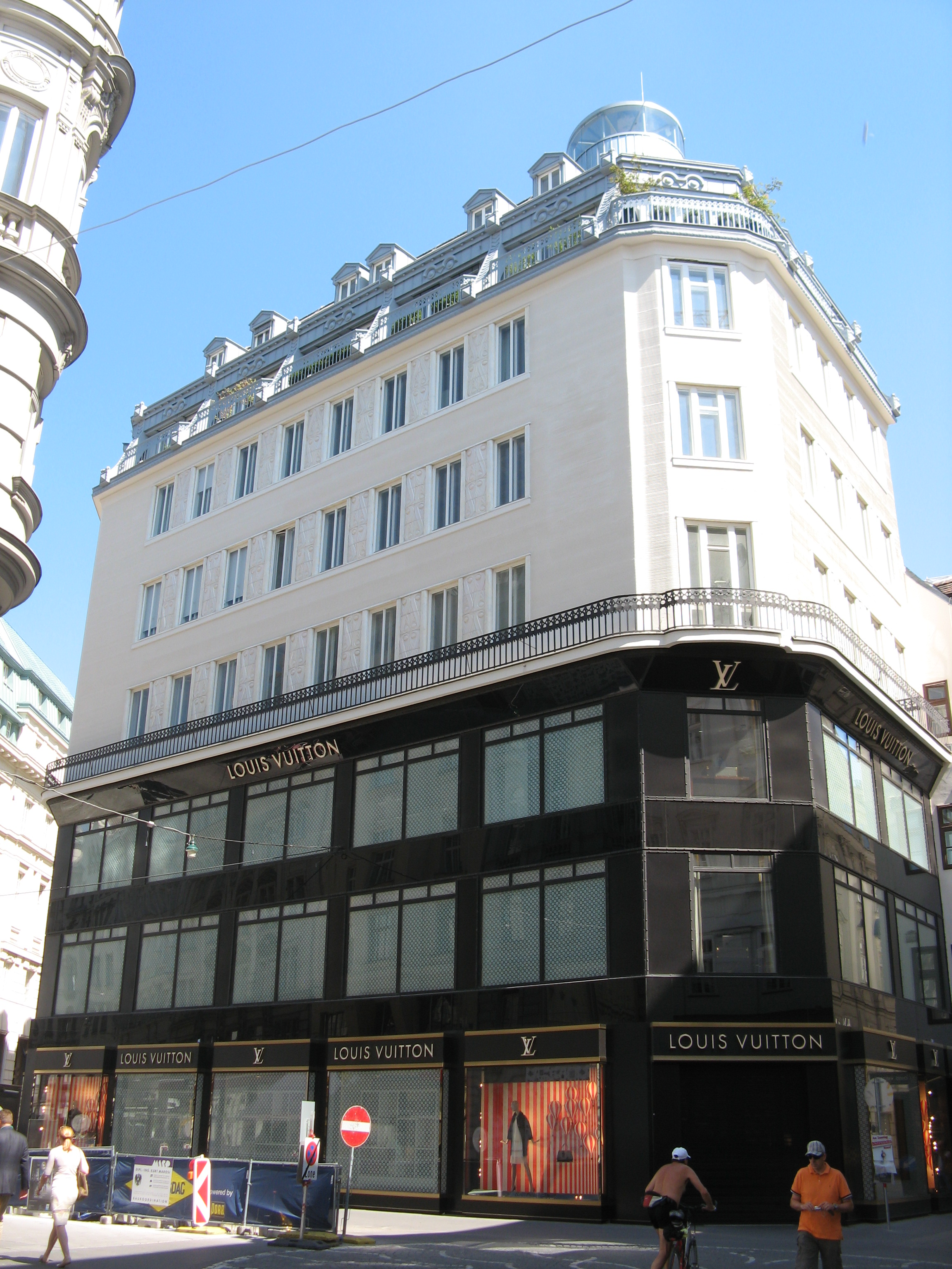 Bürohaus von Ernst Spielmann und Alfred Teller (1909-1910), Bognergasse 2, Wien-Innere Stadt